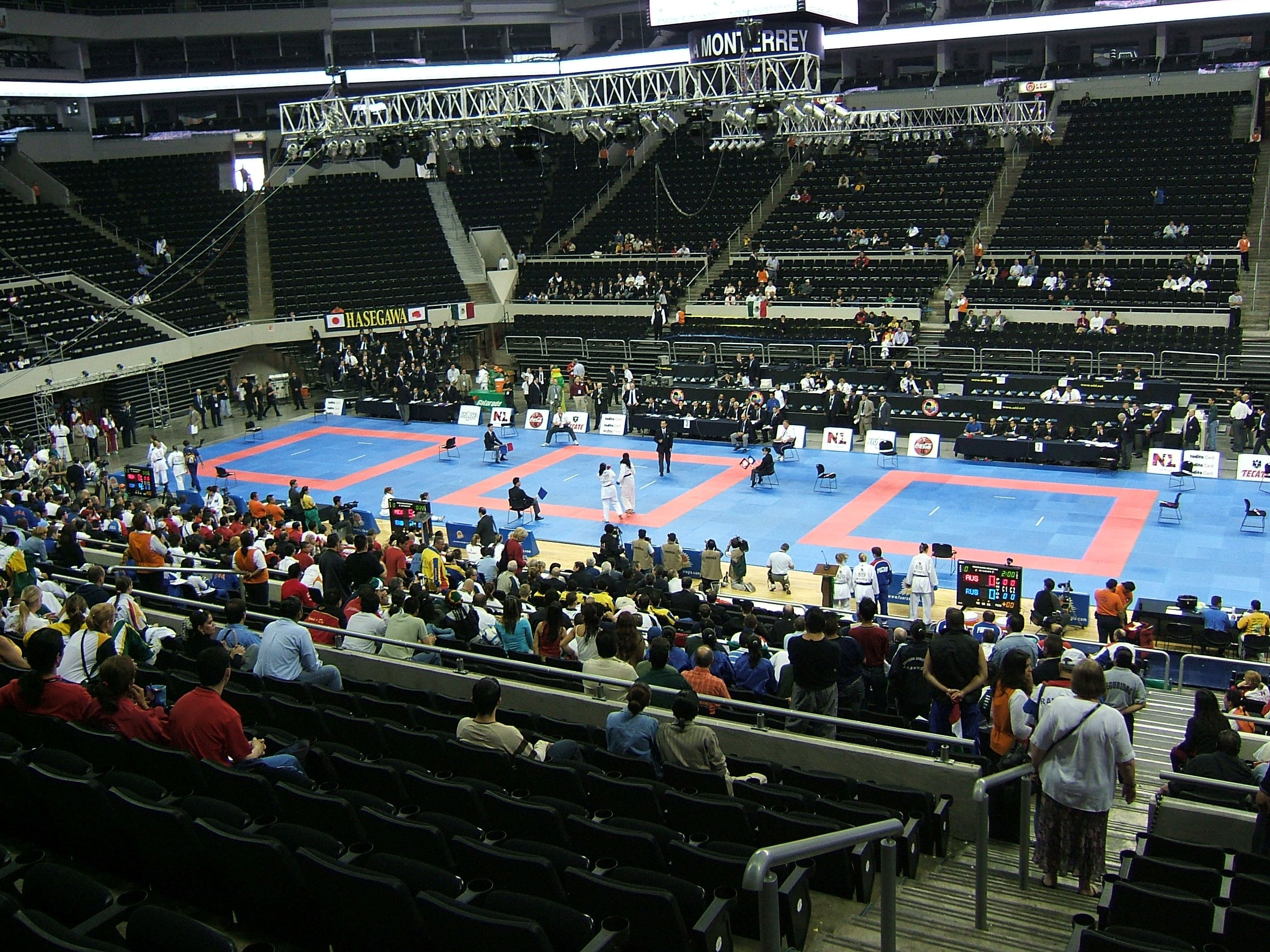 Le dojo accueillant les championnats du monde de karaté à Monterrey en 2004